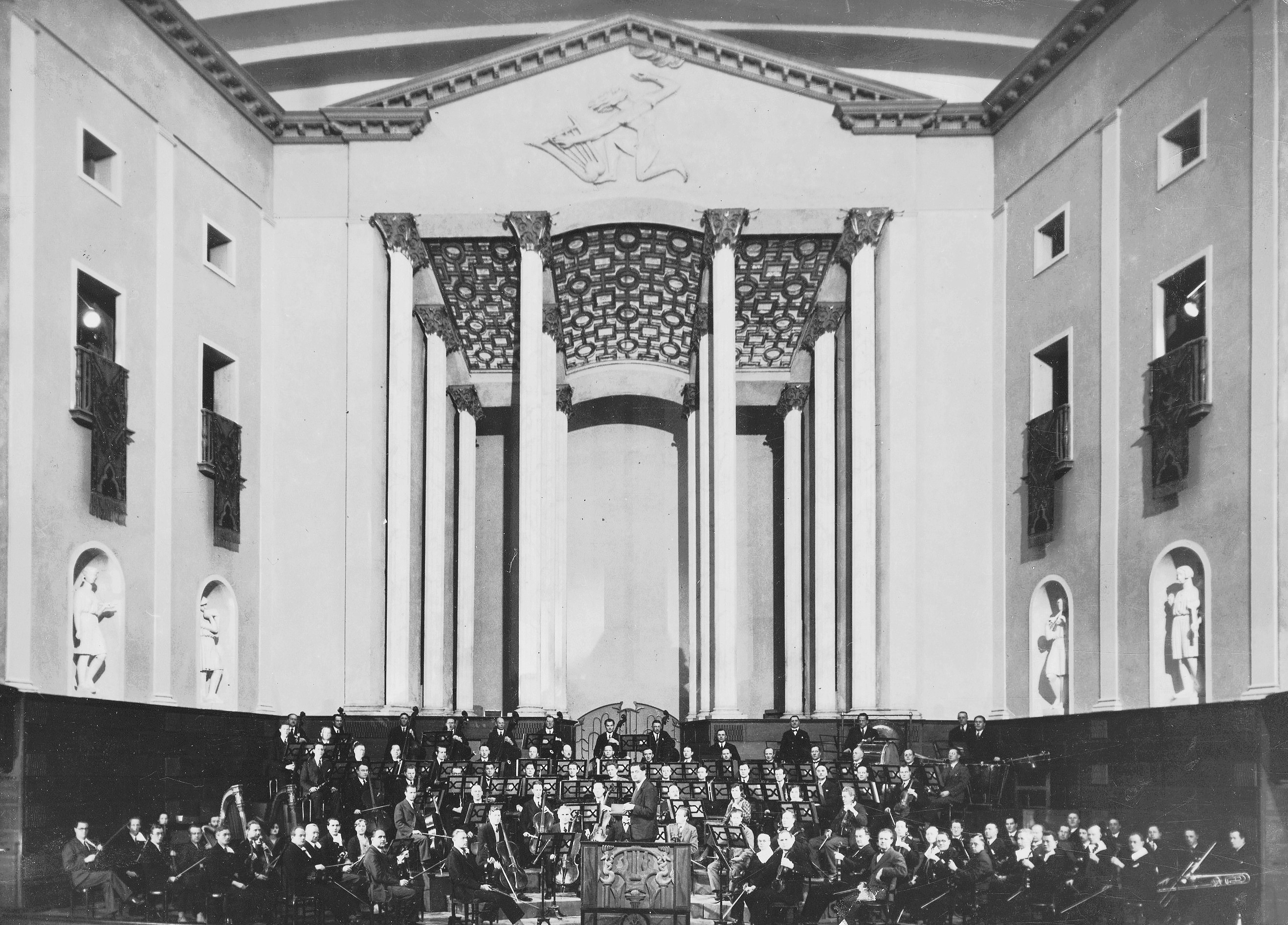 Konserthuset Stora salongen, scenen